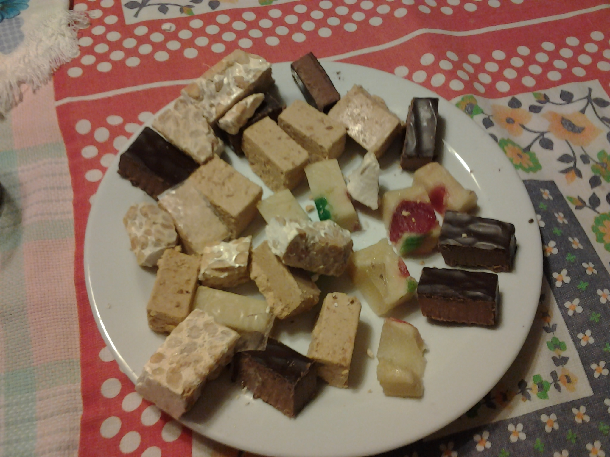 Dolços fets amb ametlla i mel, que es mengen per Nadal.